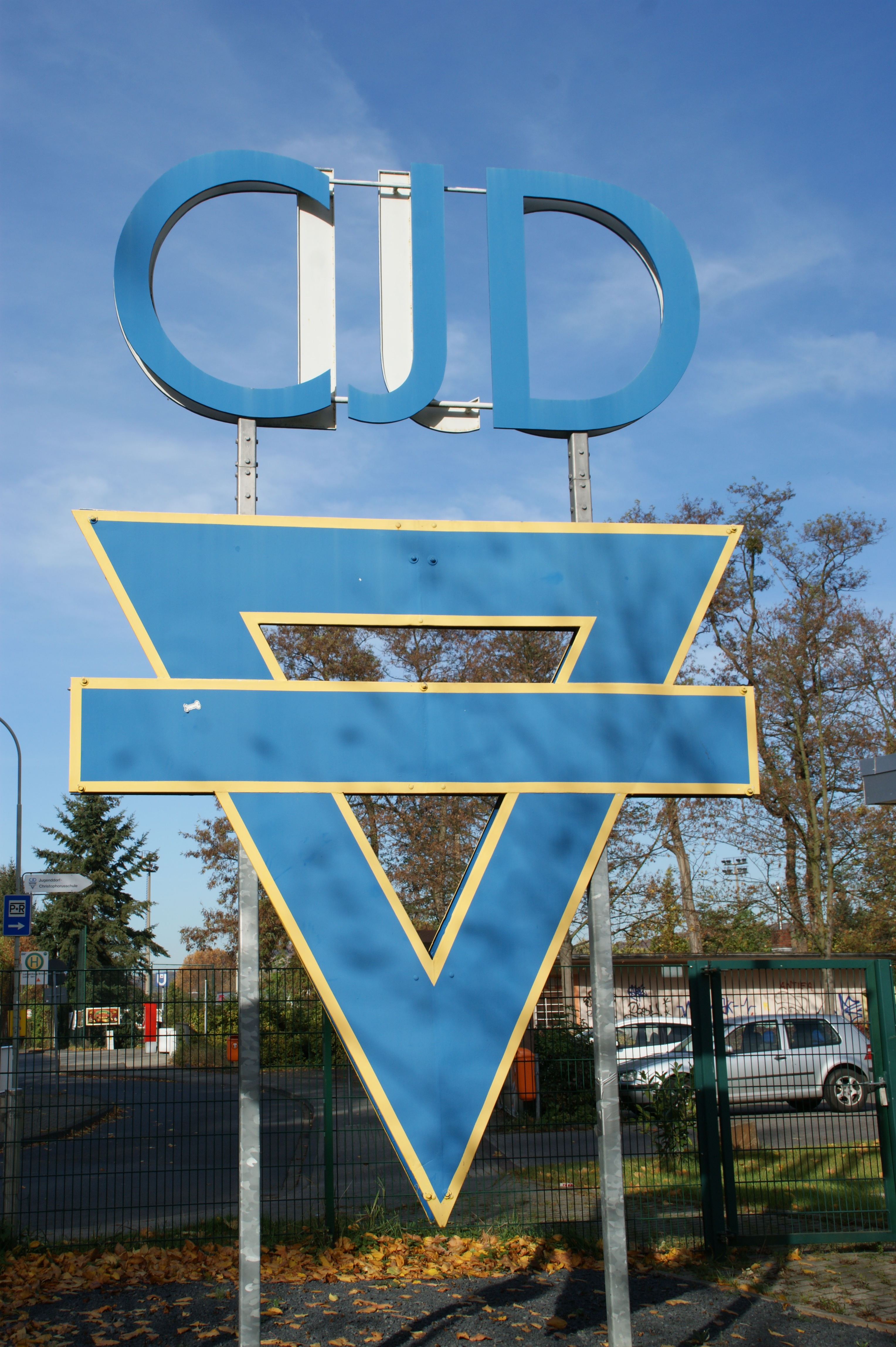 Früheres CJD-Logo, aufgestellt am CJD Königswinter